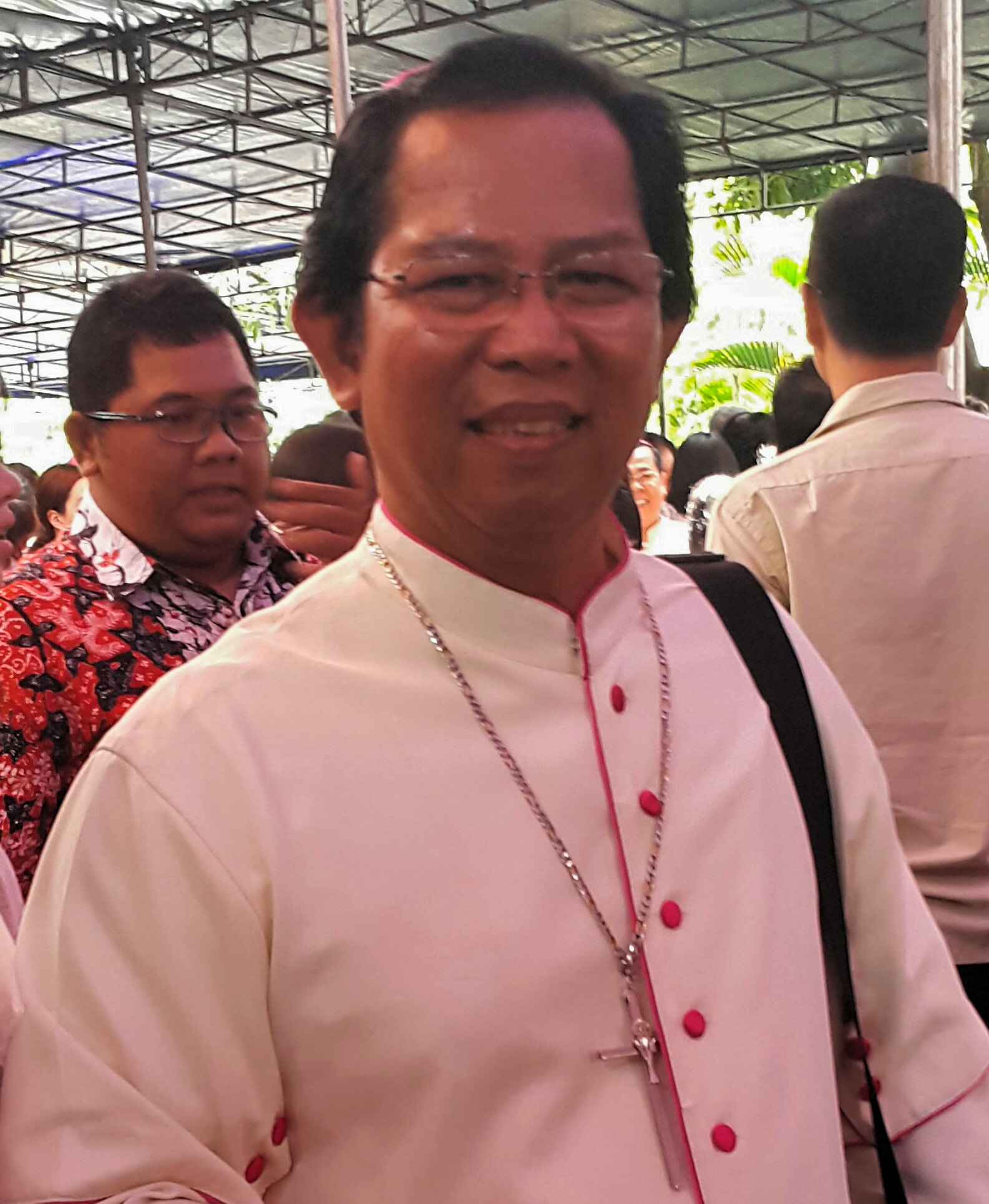 Mgr Nicolaus Adi Seputra, Uskup Agung Merauke